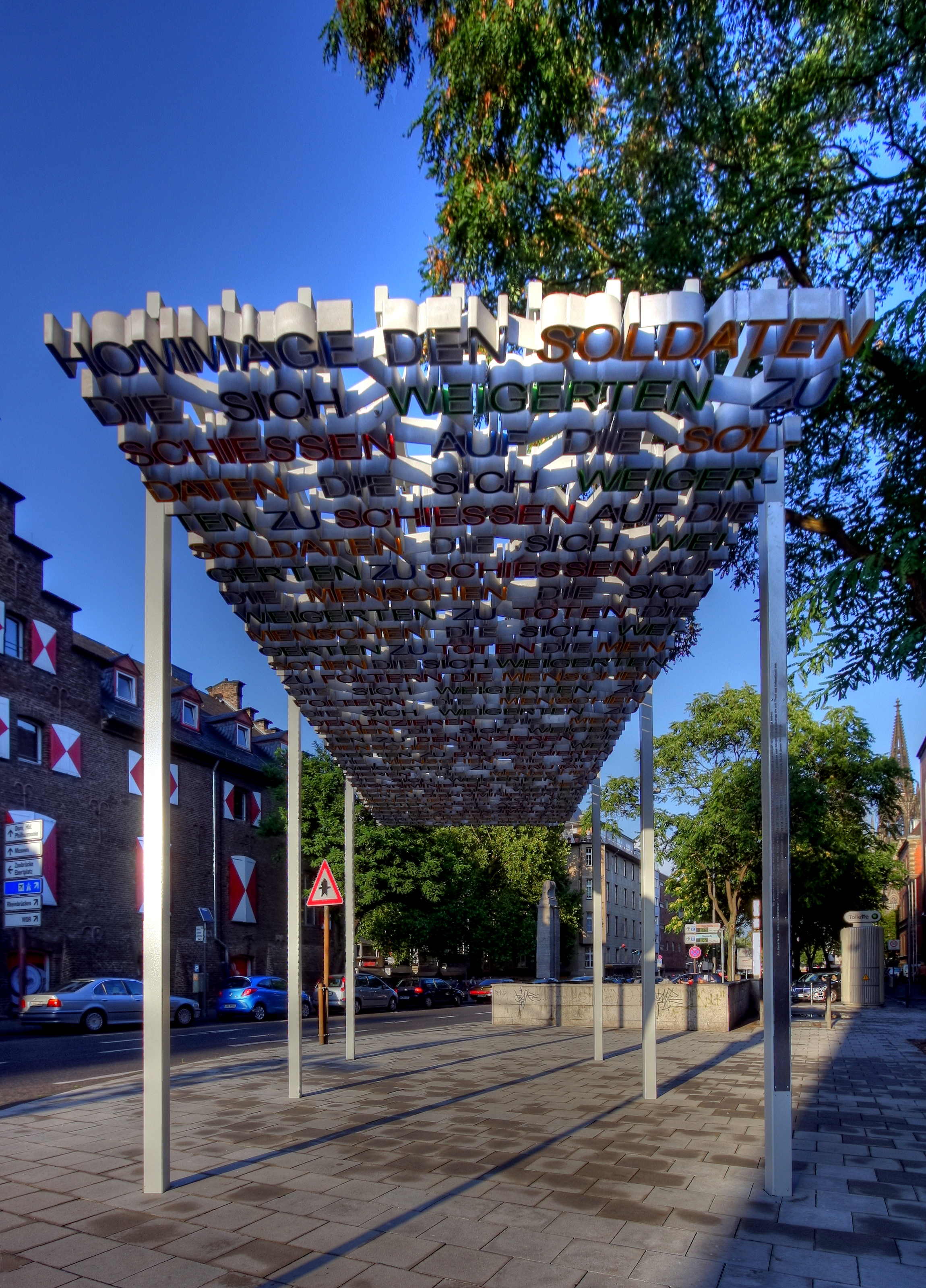 Denkmal für Deserteure und Opfer der NS-Militärjustiz. Standort: Appellhofplatz, Ecke Neven-Dumont-Str./Burgmauer, Köln. Künstler: Ruedi Baur